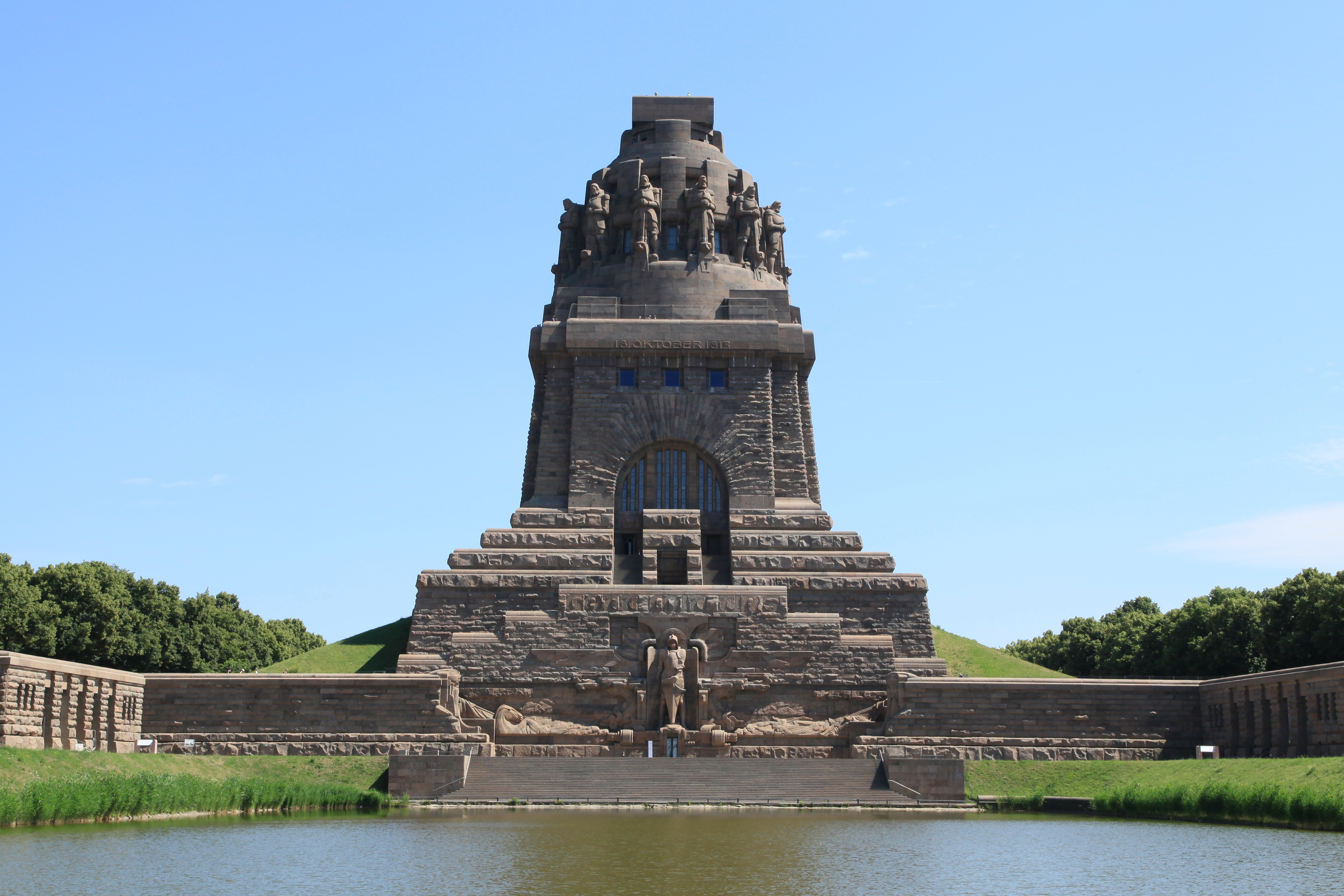 Völkerschlachtdenkmal, An der Tabaksmühle in Leipzig